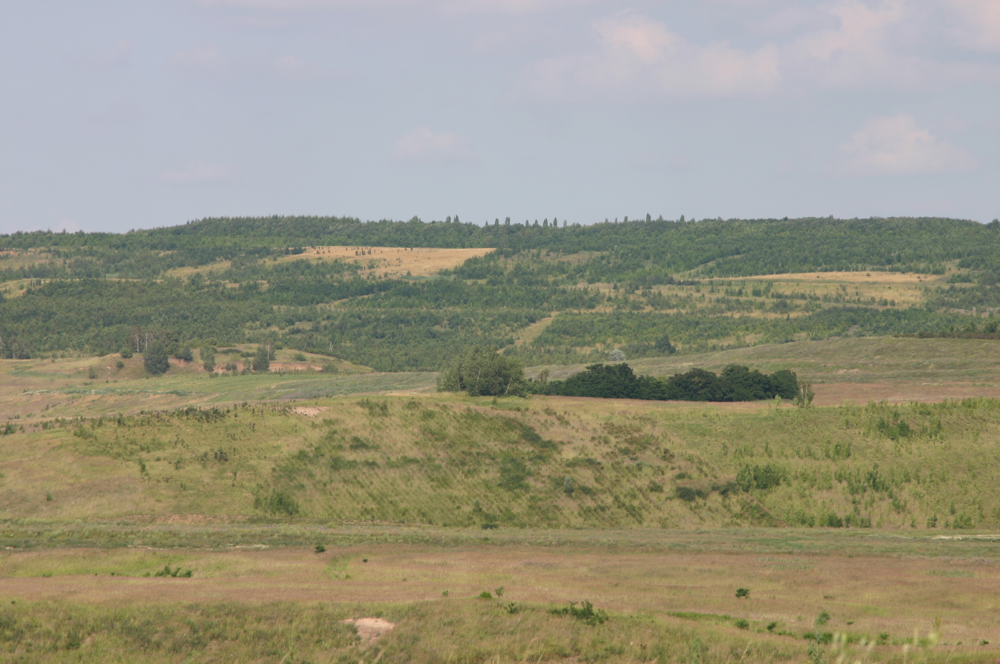 Střimická výsypka v okrese Most.